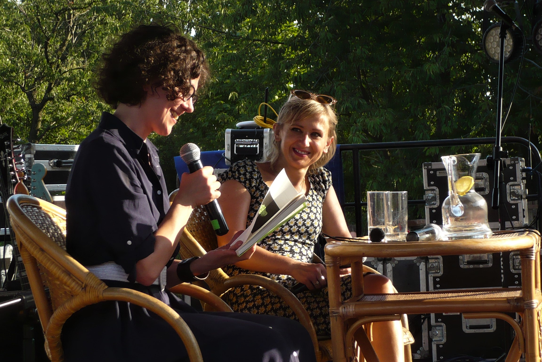 Urszula Zajączkowska, Justyna Sobolewska, Festiwal Góry Literatury, 2019